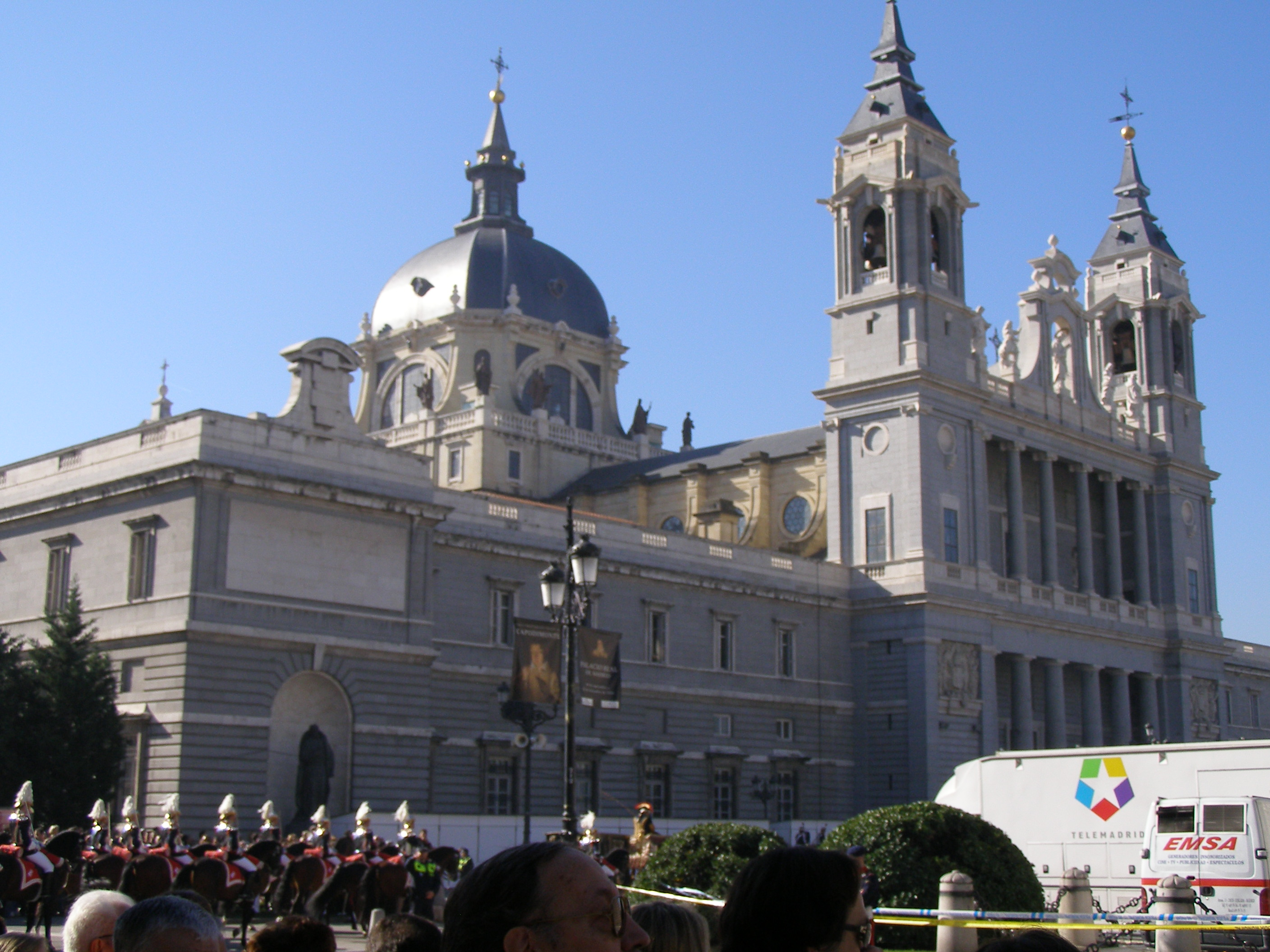 Catedral de la Almudena Cathedral / Kathedrale / Katedrála de la Almudena